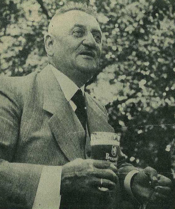 Rudolf Strnisko (1881-1952), brouwer te Eeklo